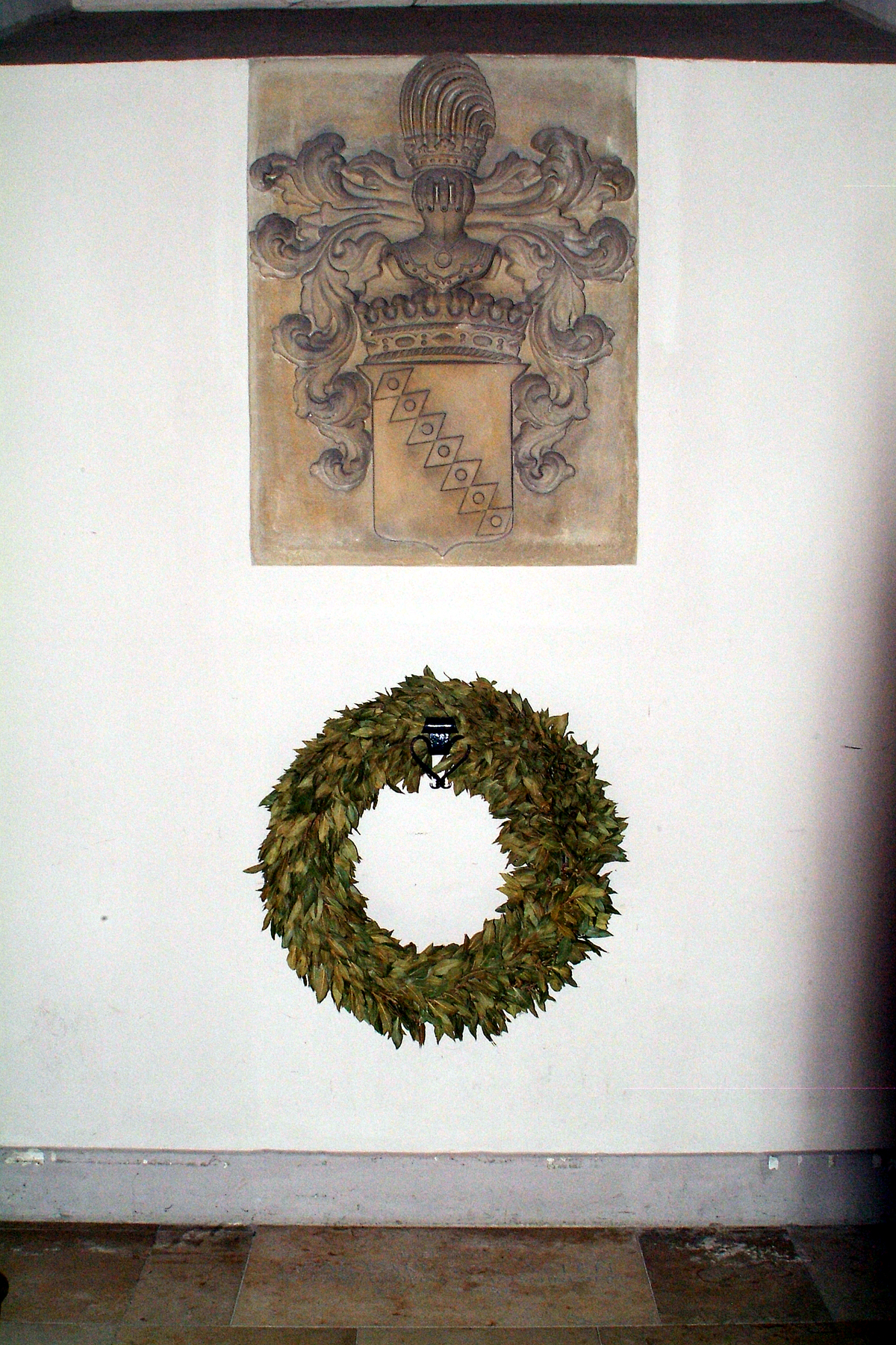 Wappen aus Sandstein und Bodenplatte für Carl August Graf von Alten, der 1958 aus dem nach dem Zweiten Weltkrieg geplünderten Mausoleum in Sundern in die Neustädter Hof- und Stadtkirche St. Johannis in Hannover überführt wurde. Die Gebeine wurden im Turm der Kirche beigesetzt.